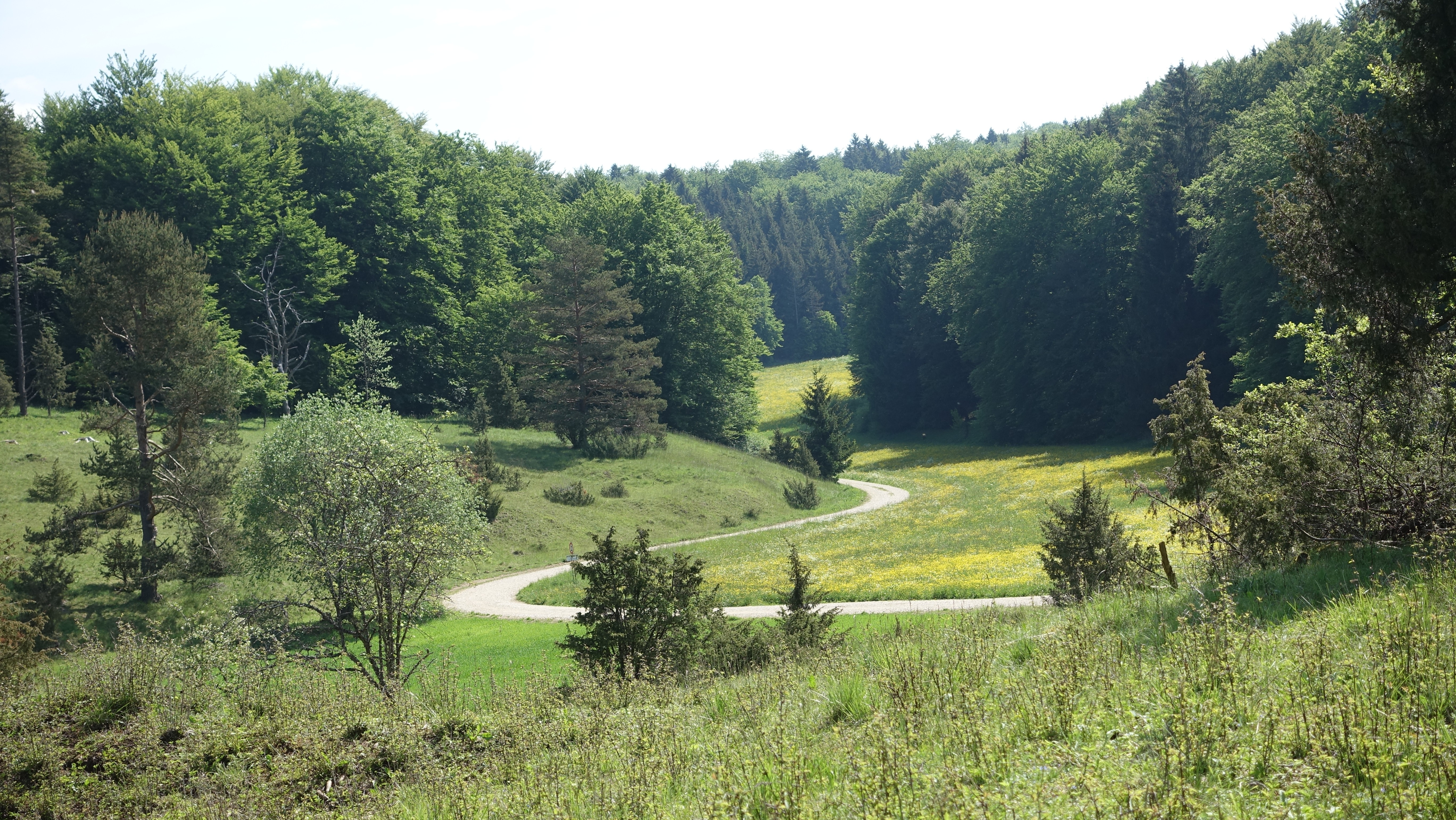 Hohenstein - Naturschutzgebiet Bauenofen